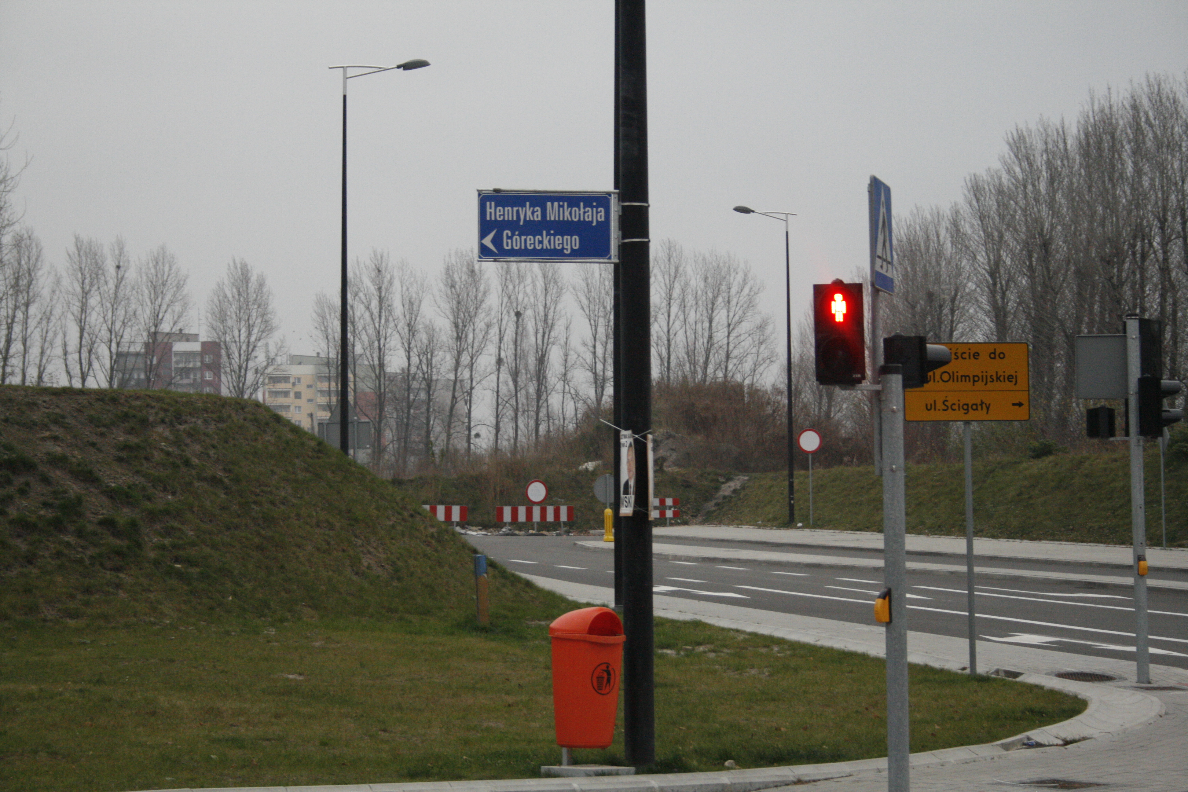 Katowice - ul. H. M. Góreckiego